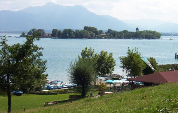 Quelle: Fotografiert Anfang September 2003 Fotograf: Gerhard Piezinger Lizenzstatus: GNU FDL